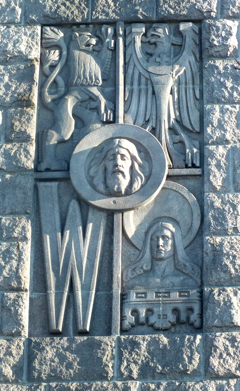 Wrocław, Most Grunwaldzki, 1907